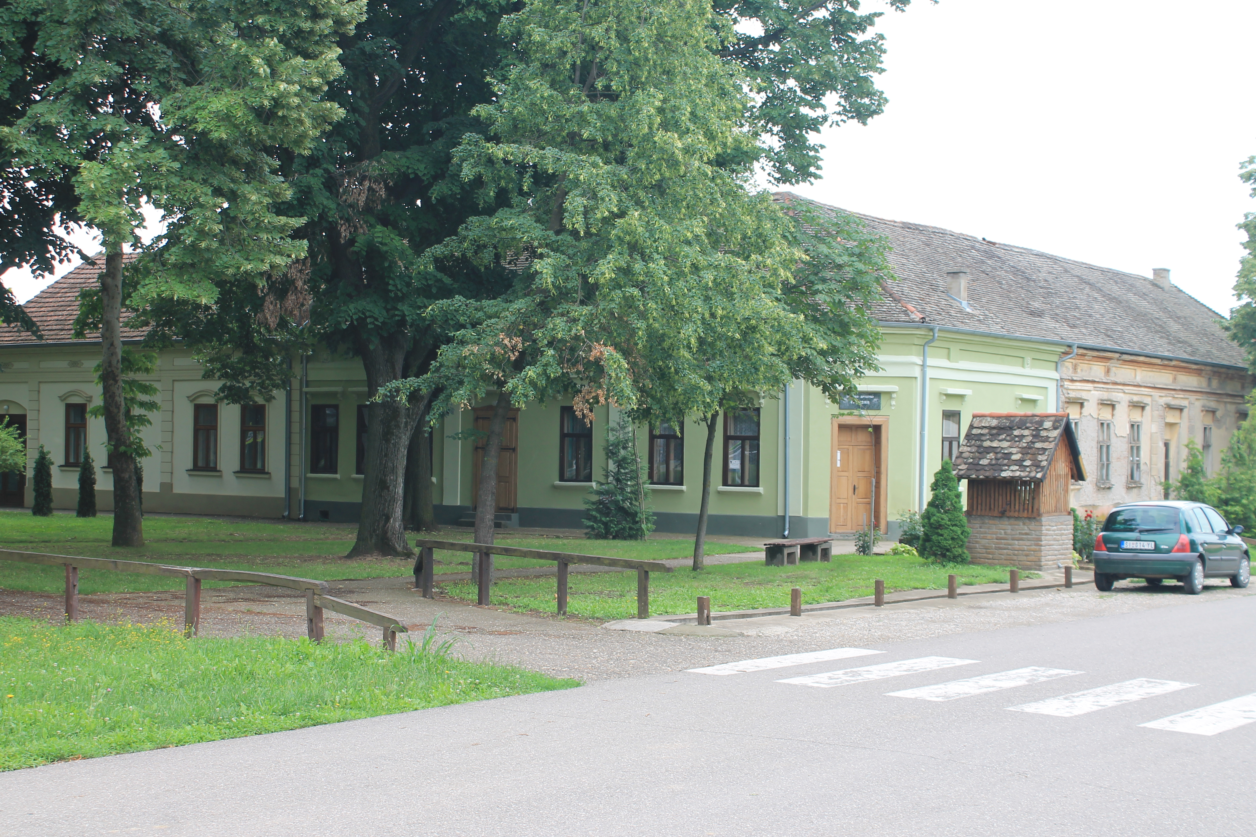 Erdevik